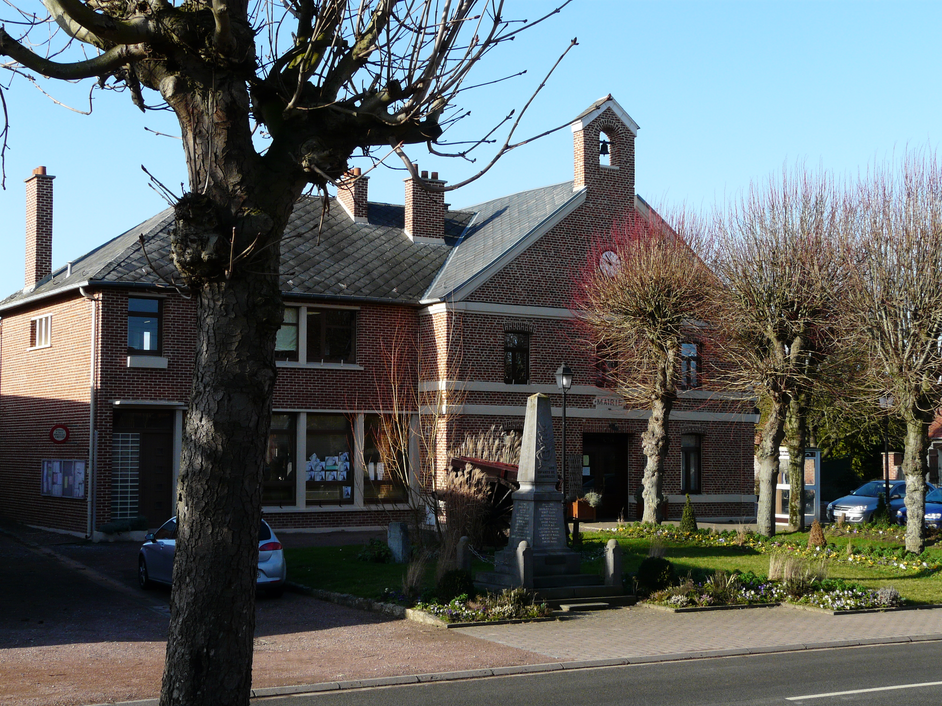 La mairie de Cagnoncles